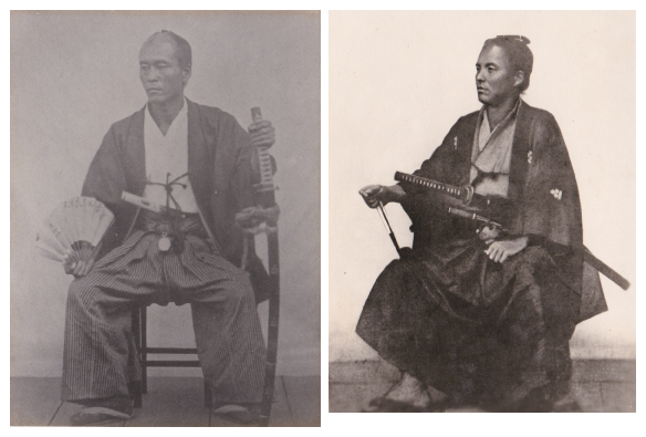 渡邉 清の写真・映像